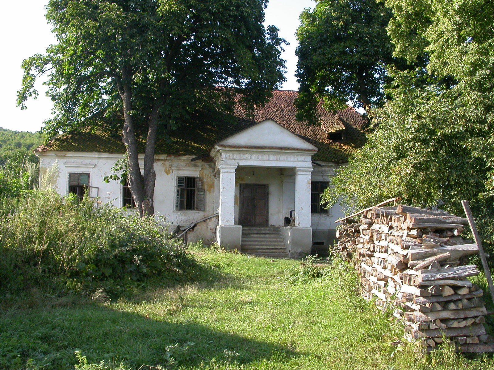 Conacul Damokos Mihály, 1844